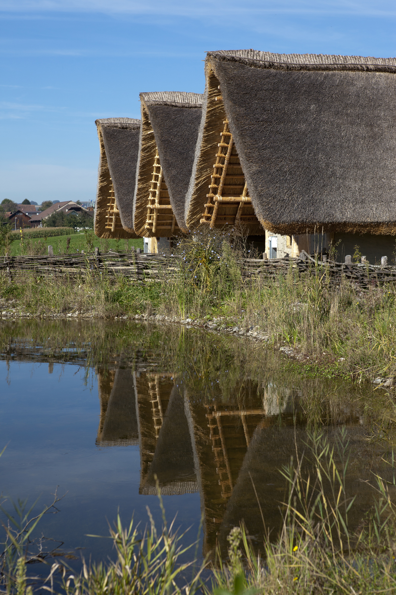 Pfahlbausiedlung beim Bahnhof von Wauwil (Wauwilermoos)